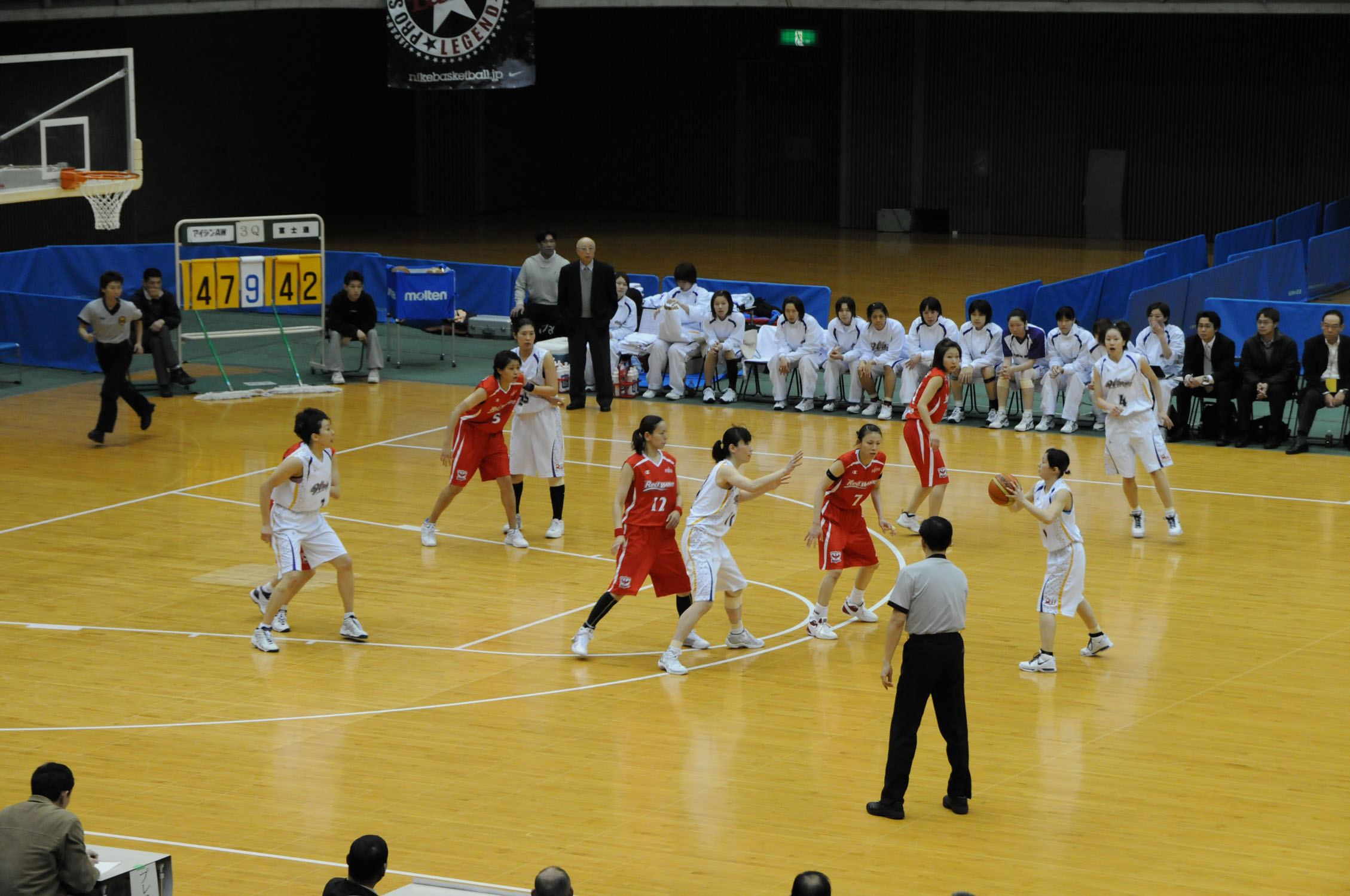 WJBL 08-09レギュラーリーグ、富士通対アイシンAW。とどろきアリーナで。